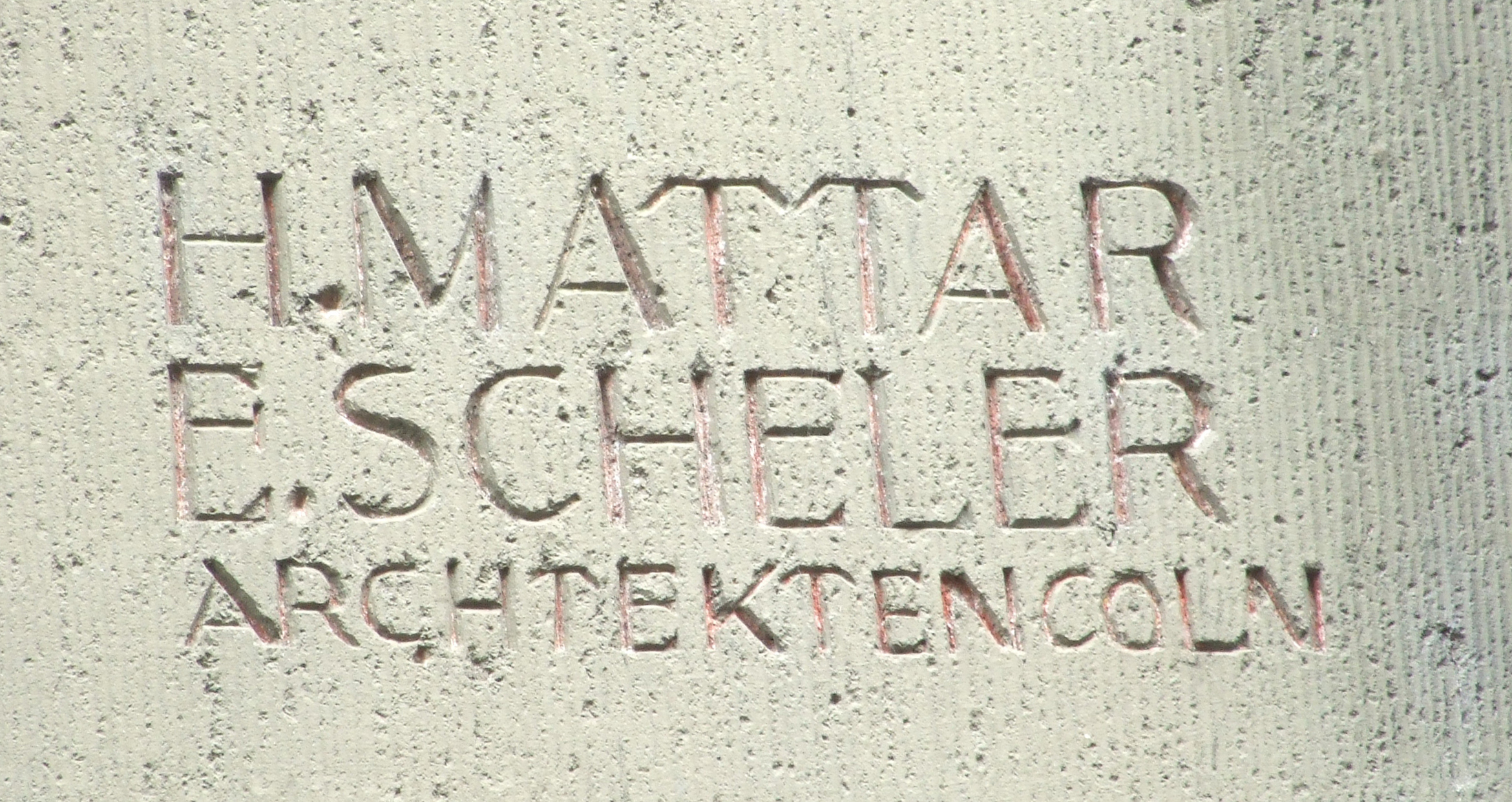 Denkmalgeschütztes Wohn- und Geschäftshaus, Rheinstraße 1, Linz am Rhein: Architektengravur (Mattar & Scheler), rechts vom Eingang